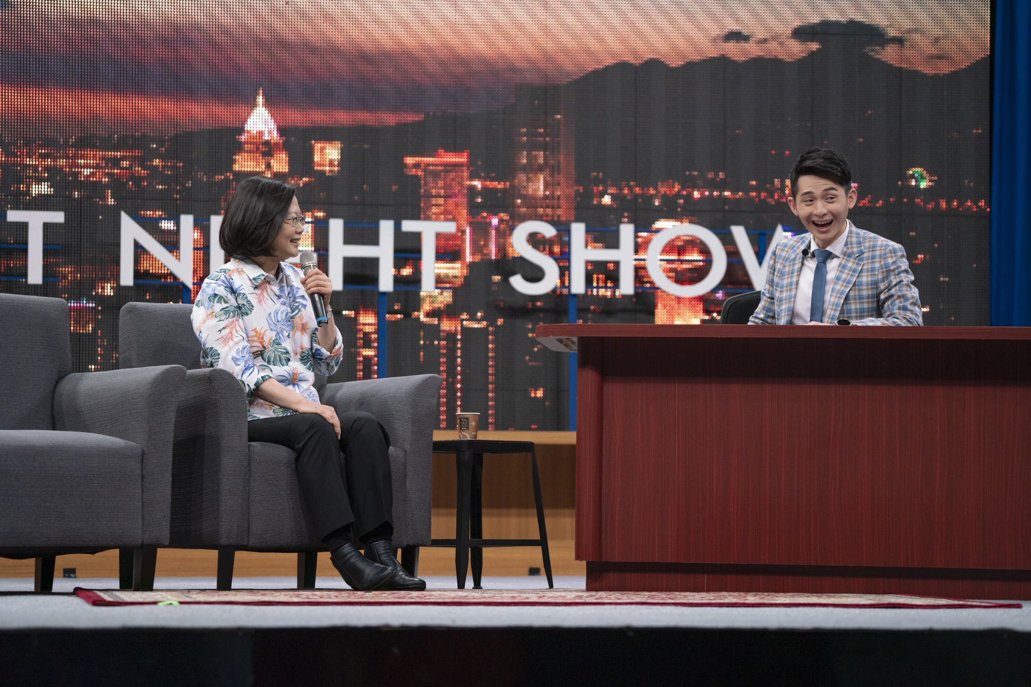 04.20 總統參加「博恩夜夜秀」錄影